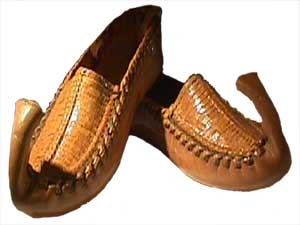 Opanci.[1]